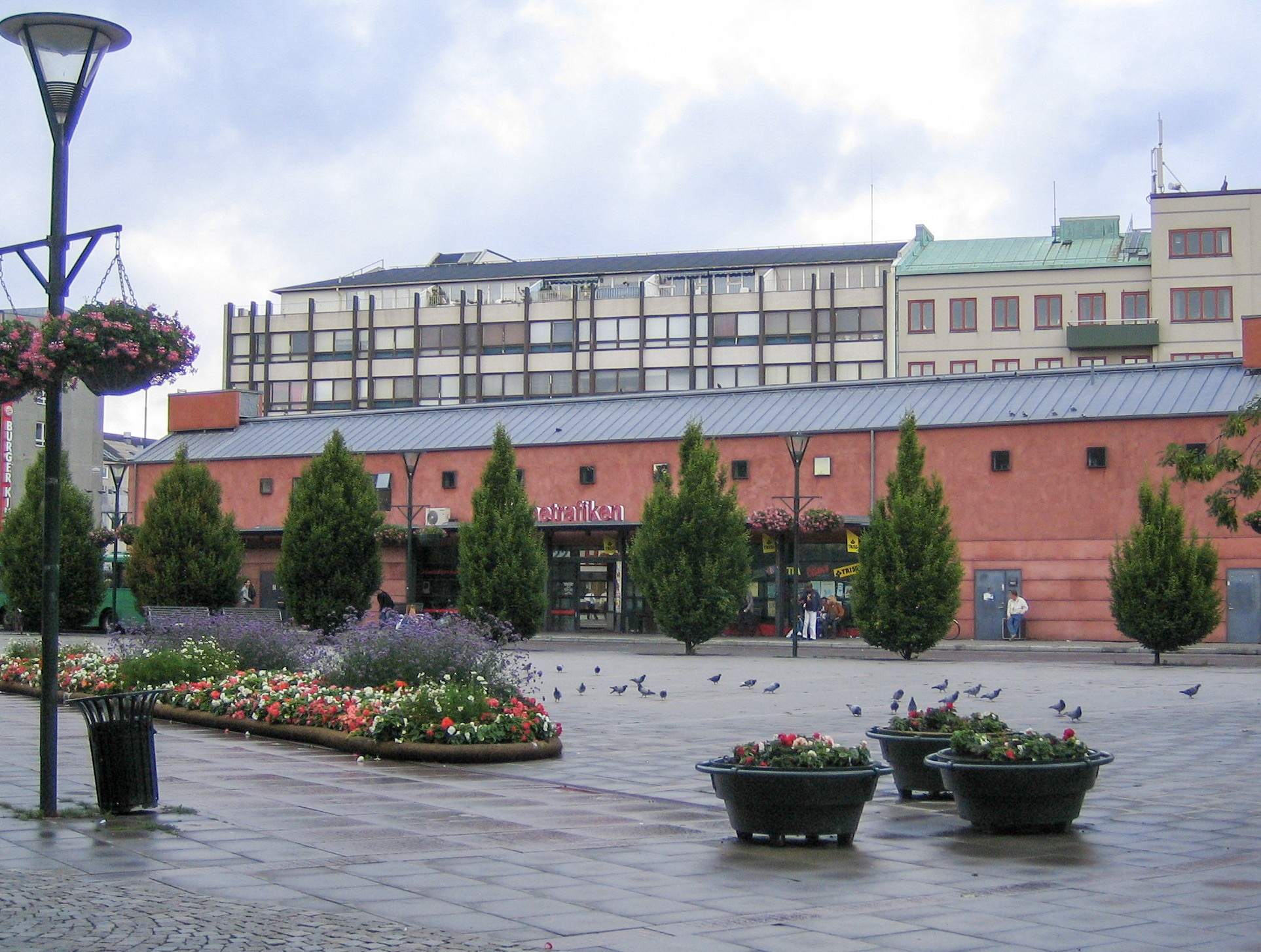 Bus terminal at Värnhemstorget in Malmö, Sweden.